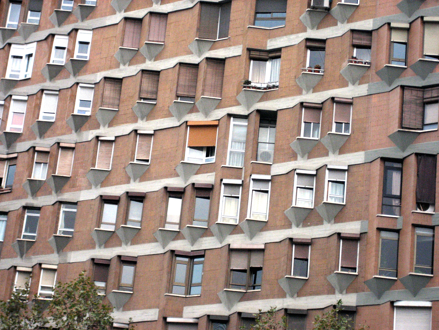 Edificio Meridiana de Oriol Bohigas en Barcelona.Cataluña España